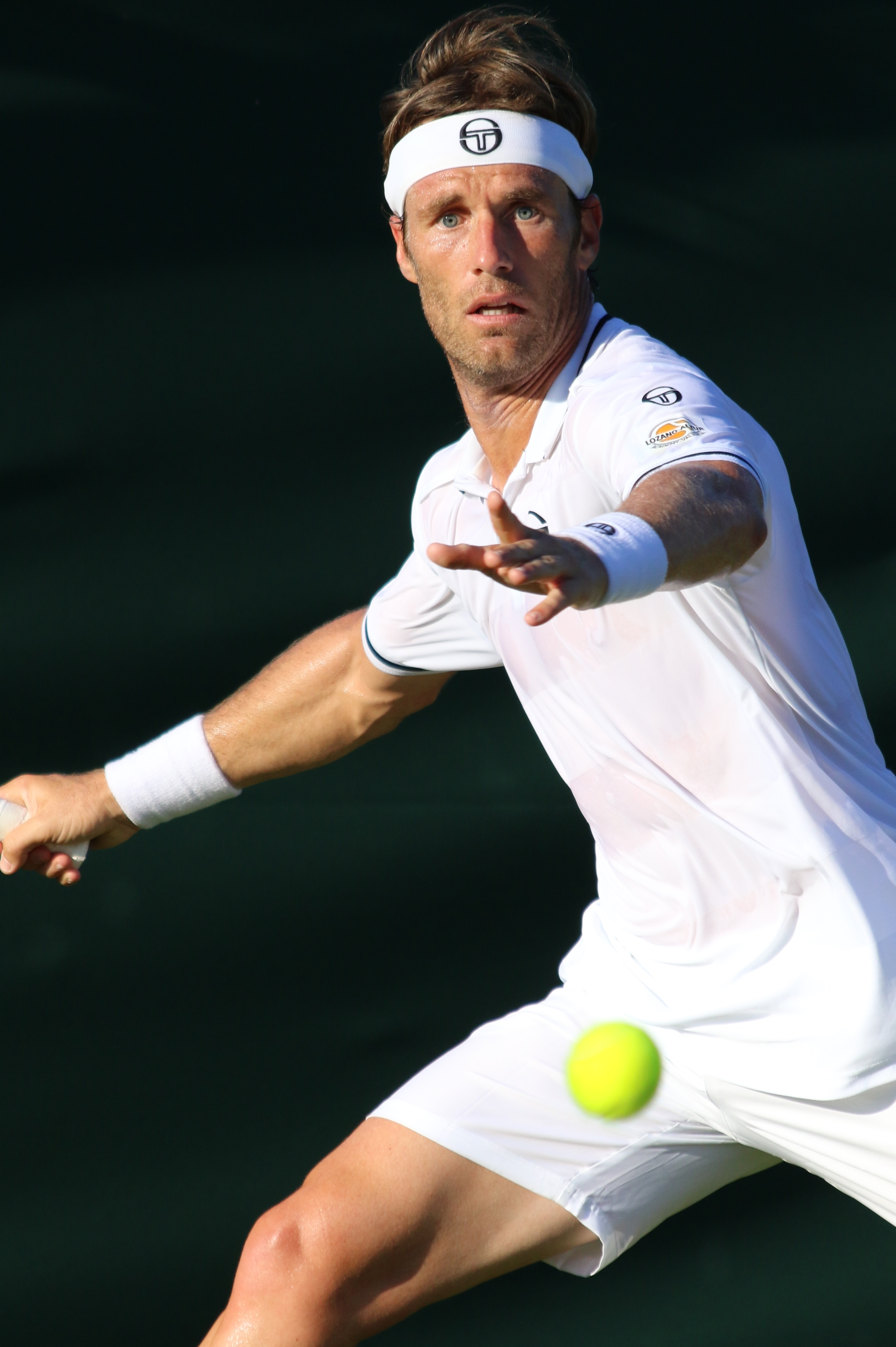 Gimeno Traver WMQ18 (7)